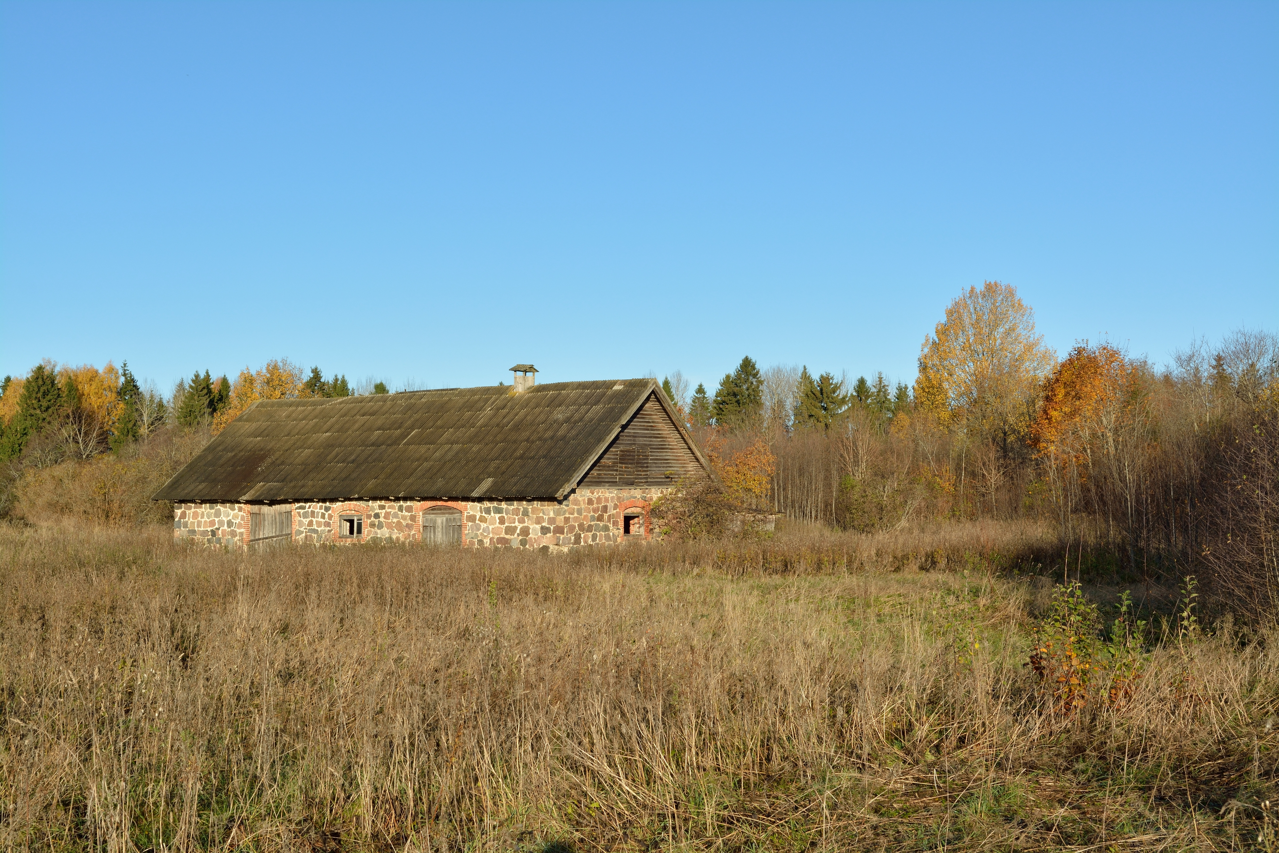 Kolu mõisa kõrvalhoone